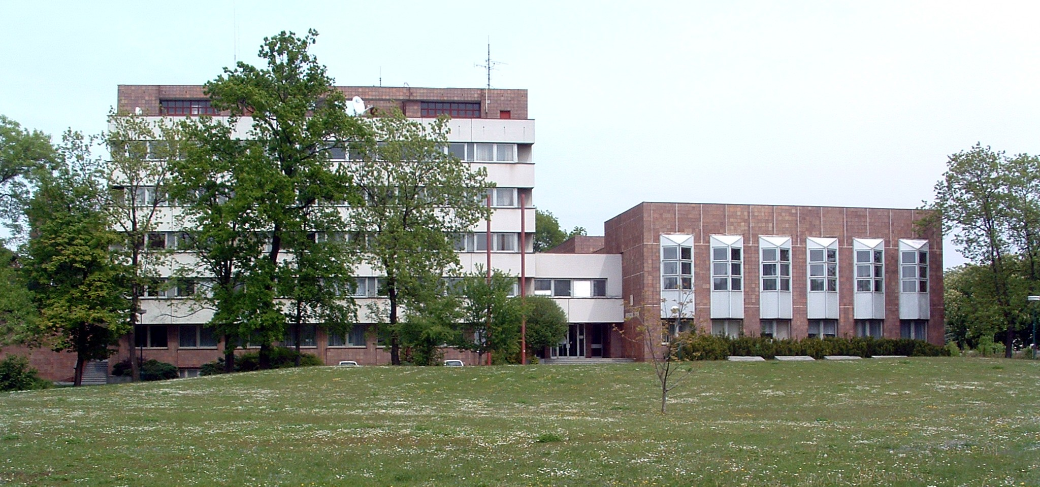 Nymburk, Obecní dům a městský a finanční úřad, Bedřicha Smetany 55/28, pohled z parku Svobody.